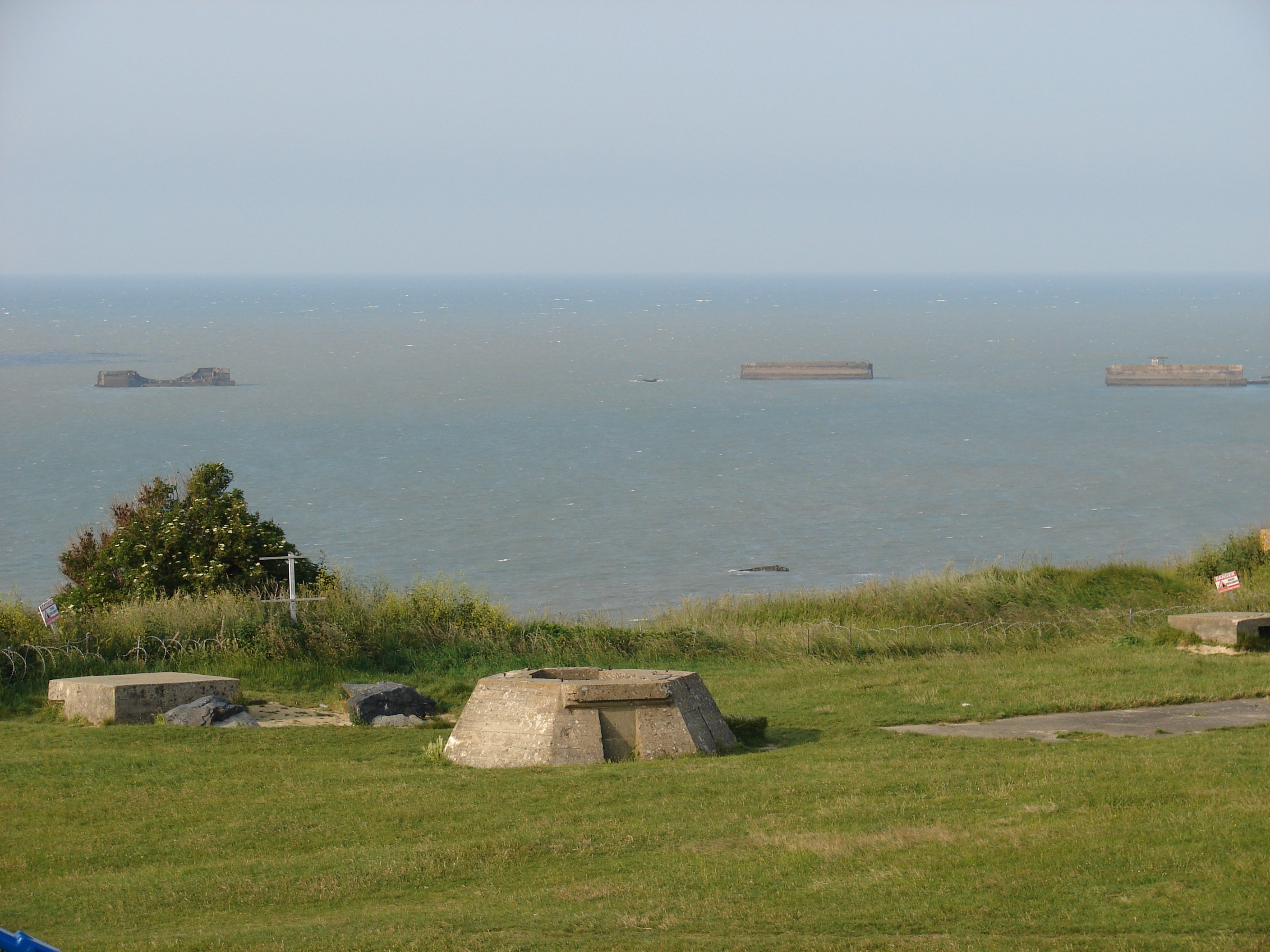 Remanescentes do porto artificial Mullberry, em Arromanches, vistos de cima das falésias a leste da vila, onde havia posição de radar alemã durante a segunda guerra. Em primeiro plano, um "Tobruck", um assentamento para metralhadora. Remnants of artificial port "Mullberry" in Arromanches, FR. View from the cliffs east of Arromanches, an old german radar site. Center view, one "Tobruck", a machine gun emplacement.